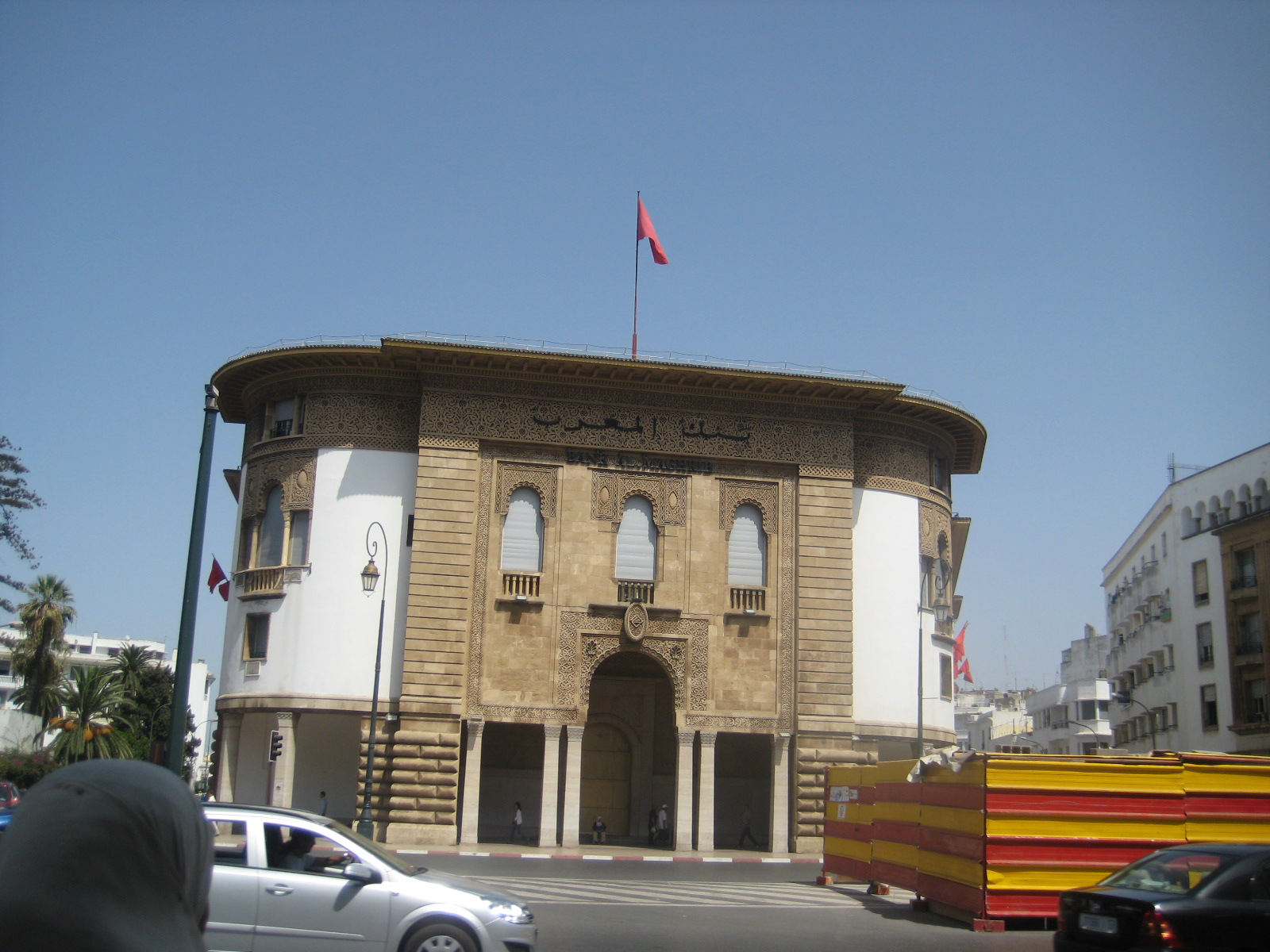 Bank Al-Maghrib Governor Abdellatif Jouahri says that Morocco is interested in promoting Islamic finance. قال والي بنك المغرب عبد اللطيف الجوهري إن المغرب مهتم بتطوير خدمات التمويل المالي. Le gouverneur de la Banque Al-Maghrib Abdellatif Jouahri explique que le Maroc souhaite promouvoir la finance islamique.